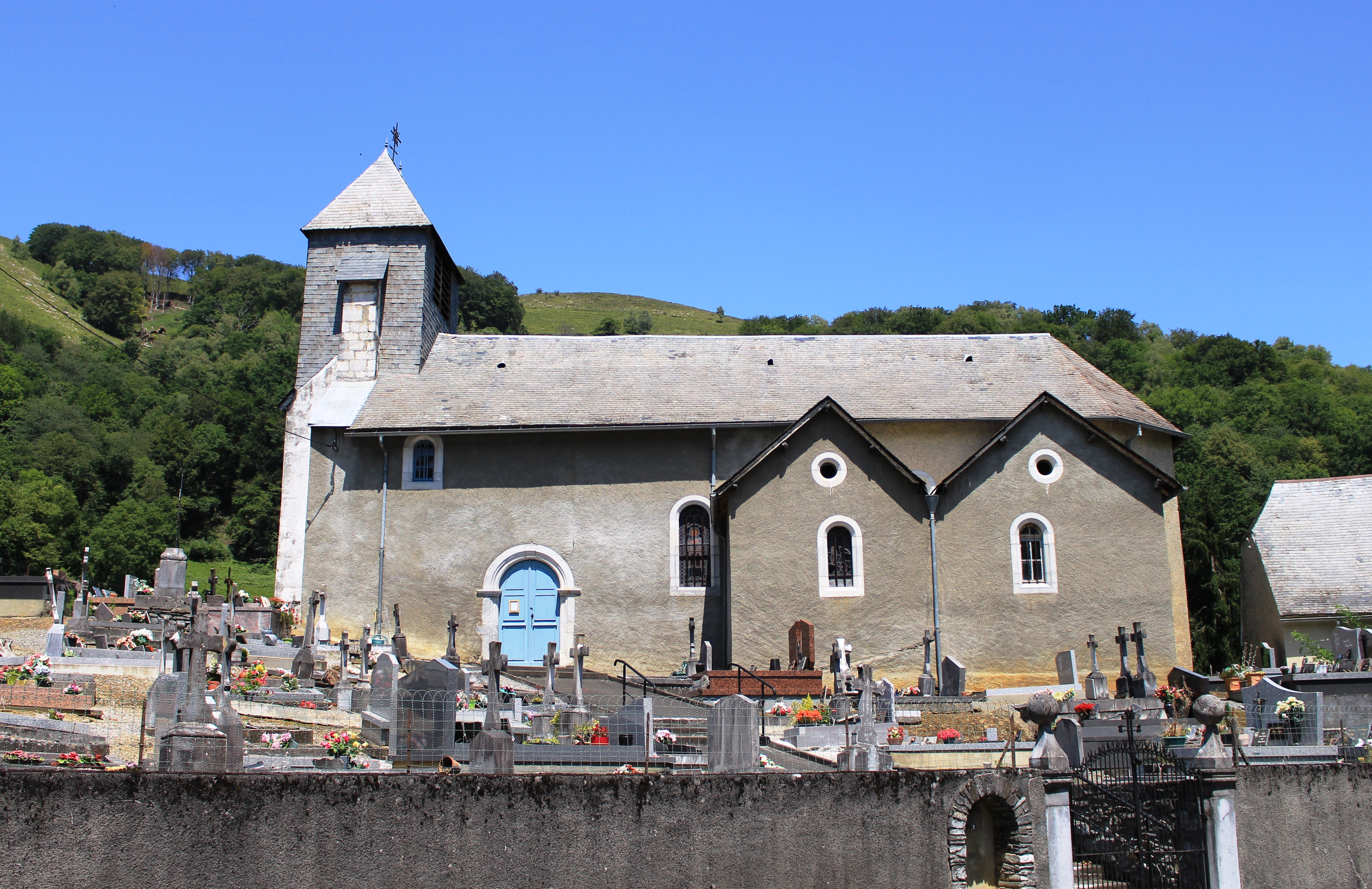 Église Saint-Blaise de Bulan (Hautes-Pyrénées)